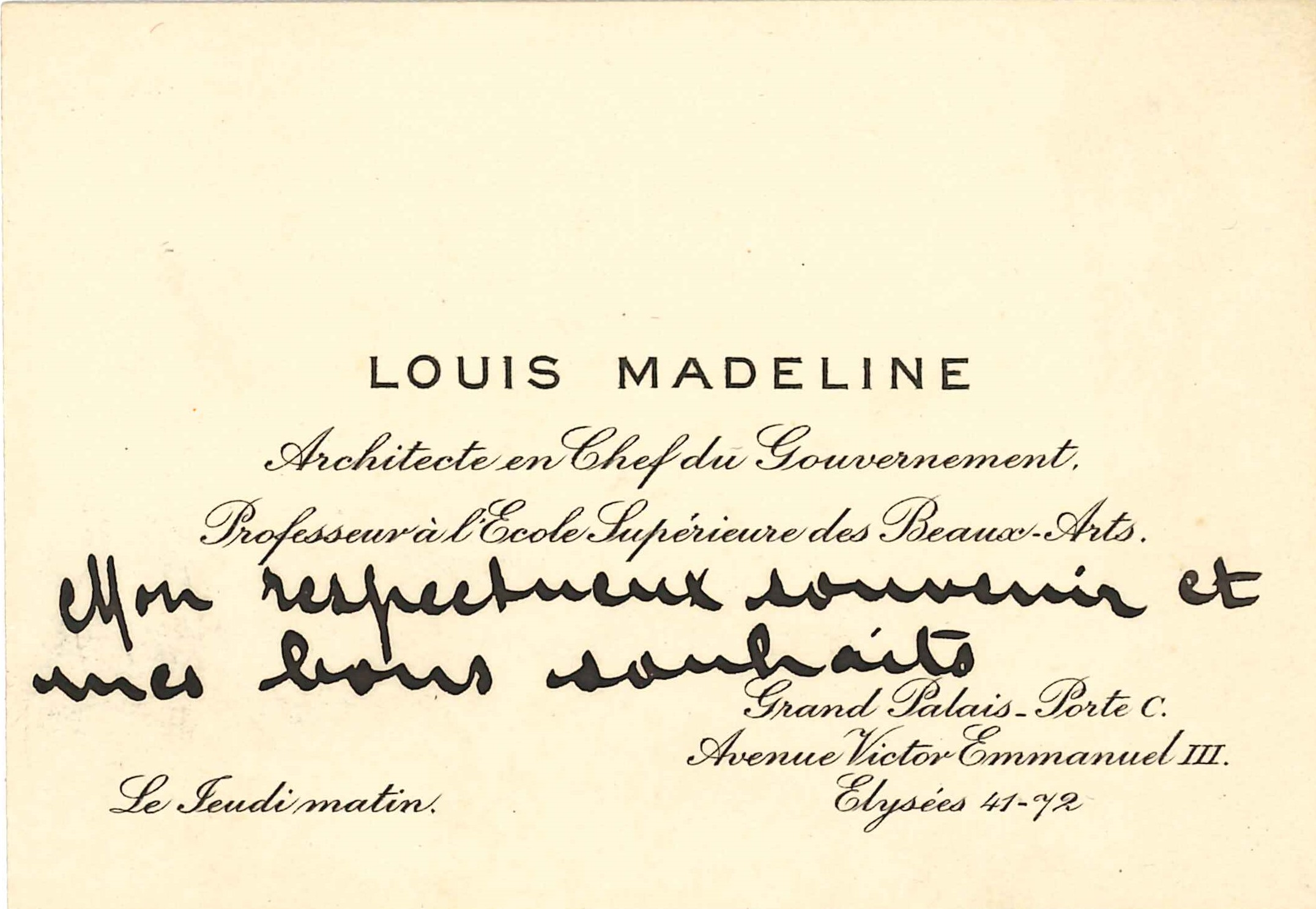 Carte de visite manuscrite de Louis Madeline (1882–1962), architecte français. Cette carte fut adressée à Monseigneur Charles Aimond. Source : Archives Jean Grosdidier de Matons (1926–2017), sans doute par sa nièce Jeanne Buitge qui accompagna Mgr Aimond au cours de sa vie.